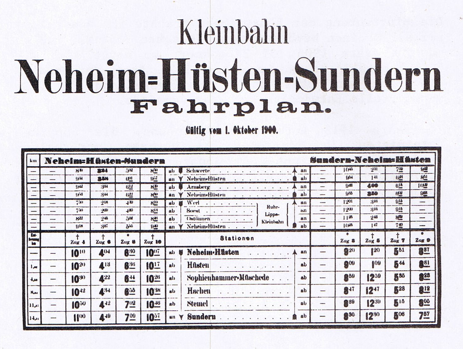 Röhrtalbahn GFahrplan 1900